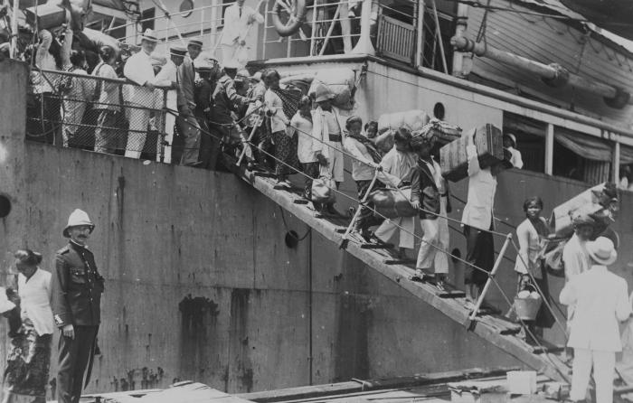 foto. Javaanse immigranten op de loopplank van het passagiersschip dat hen naar Suriname heeft gebracht